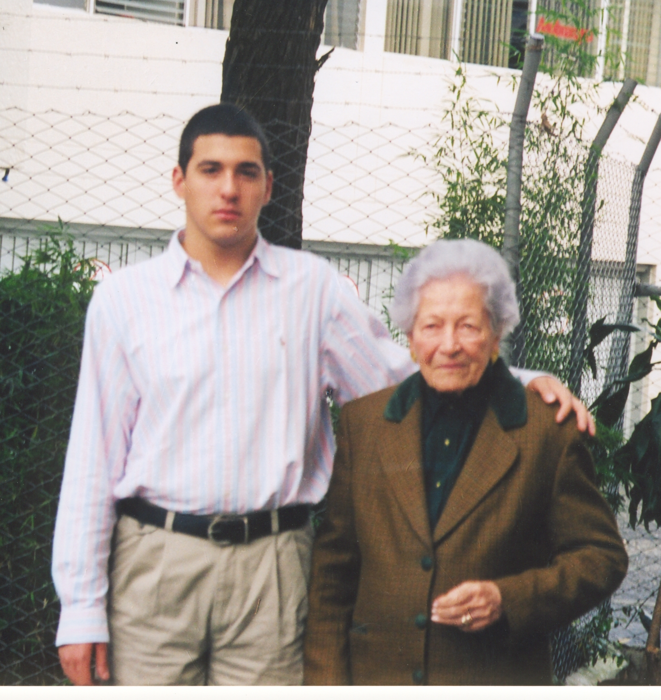 Jesusita Vallejo de Mora Vásquez y Mateo Blanco en Medellin Colombia .